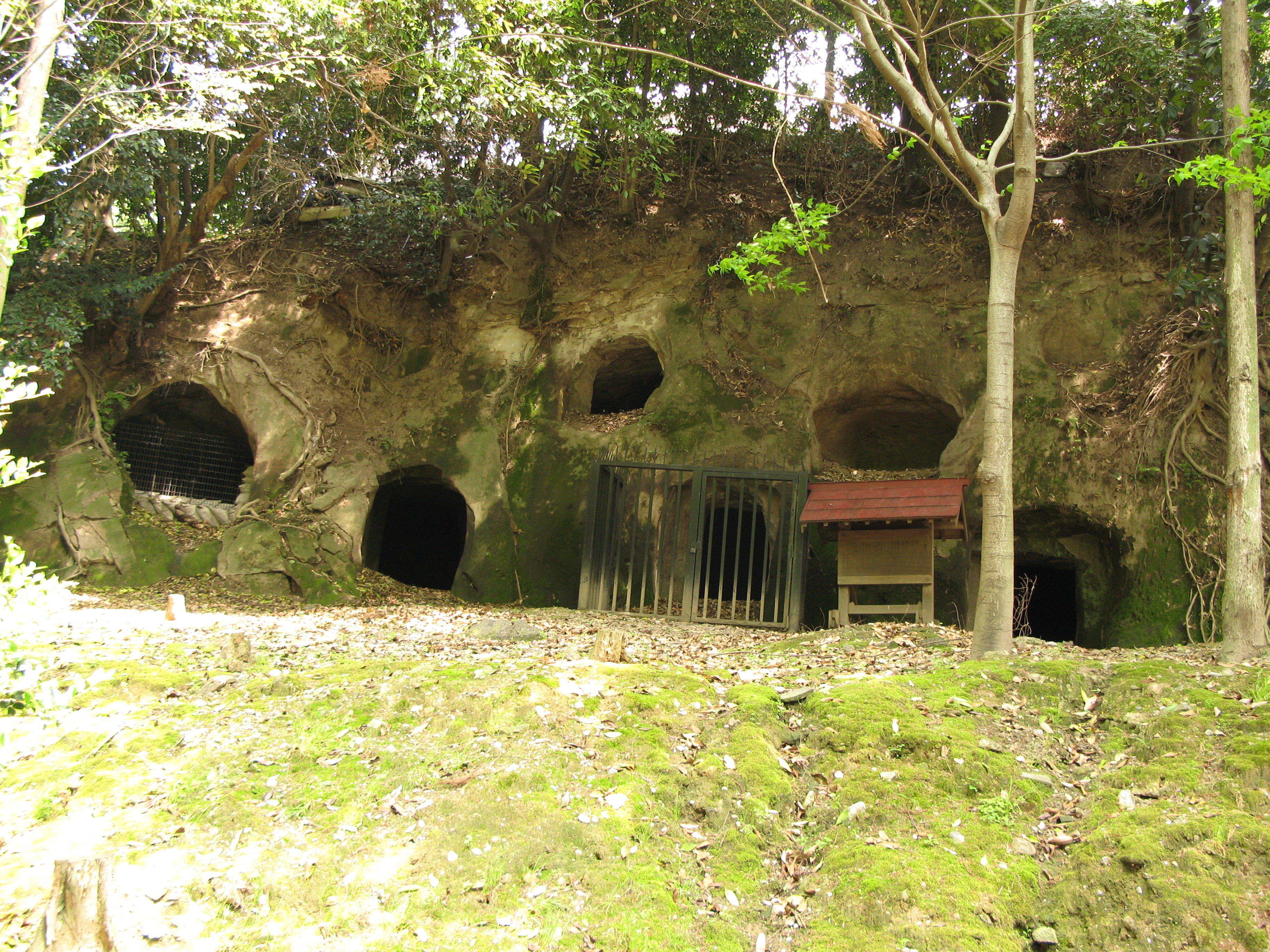 Anpukuji-Ouketsubo in Kashiwara, Osaka, Japan